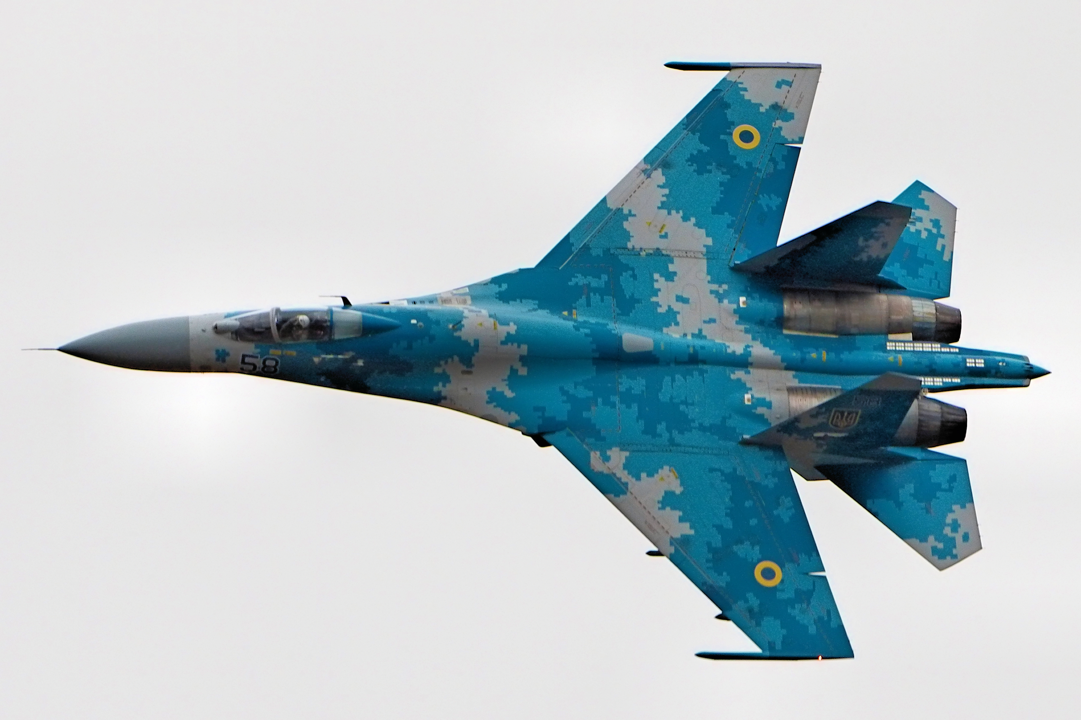 SU27 - RIAT 2017